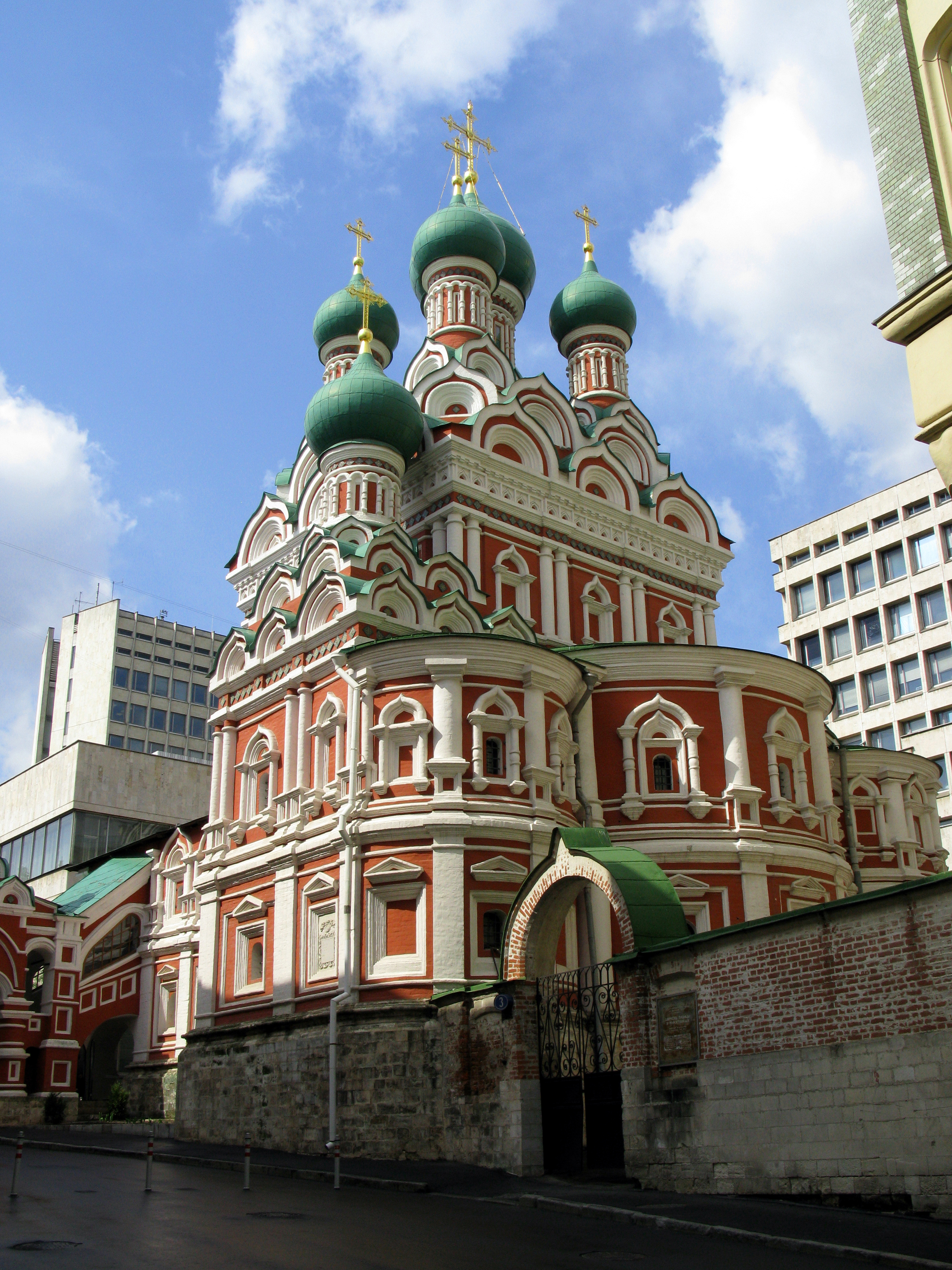 Храм Троицы Живоначальной в Никитниках (Грузинской иконы Божией Матери на Варварке)